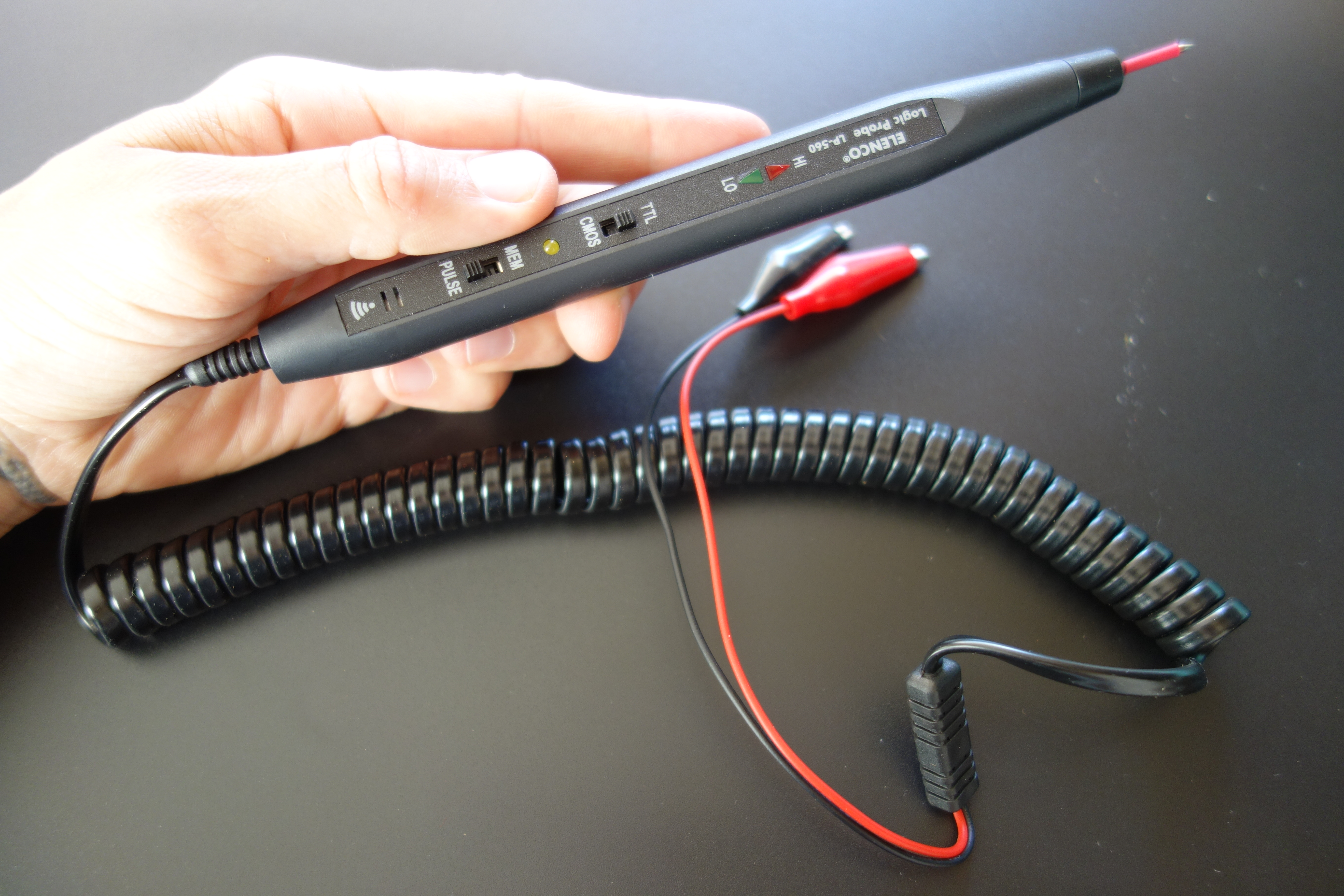 Logic probe